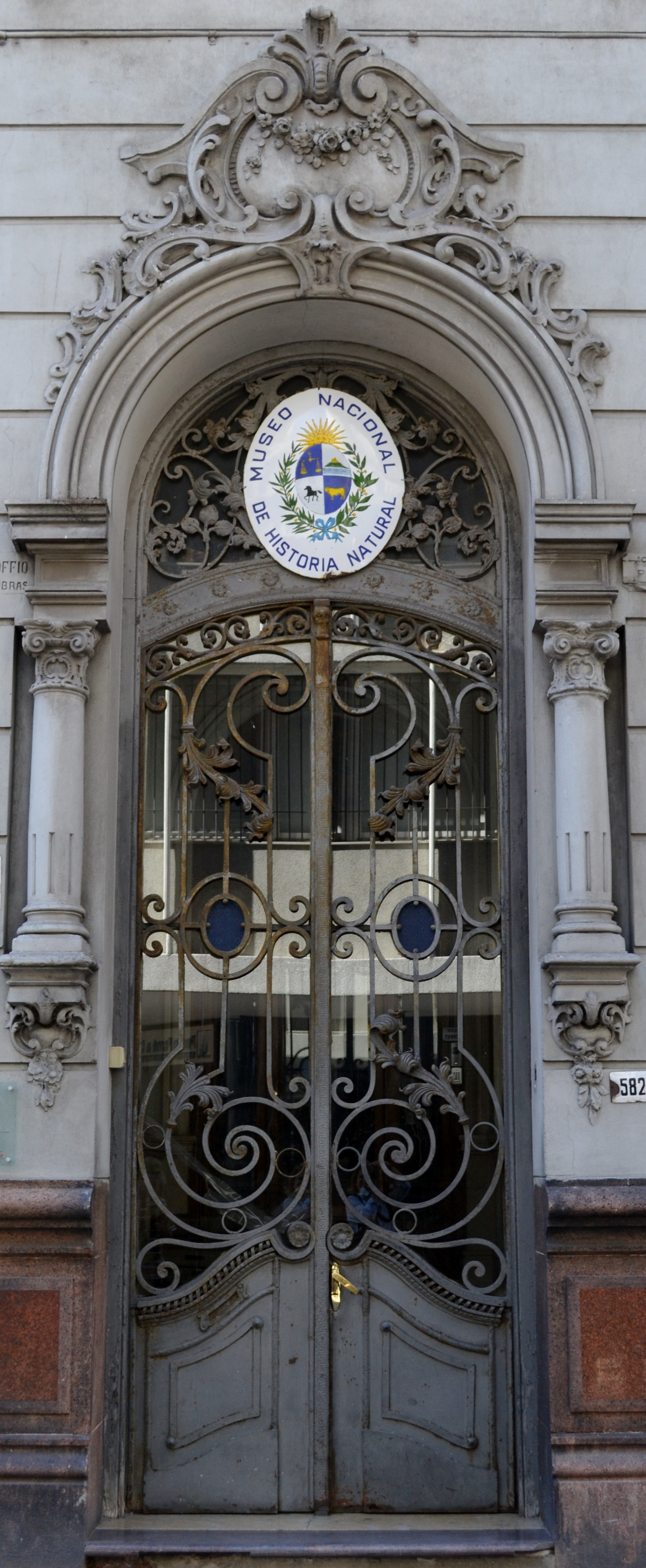 Museo nacional de historia natural; Ubicada en Cerrito 586, Ciudad Vieja, Montevideo, Uruguay.